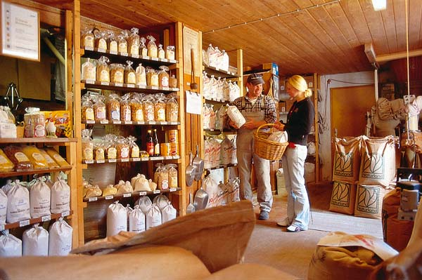 Dinkelmühle Graf - Verkaufsraum